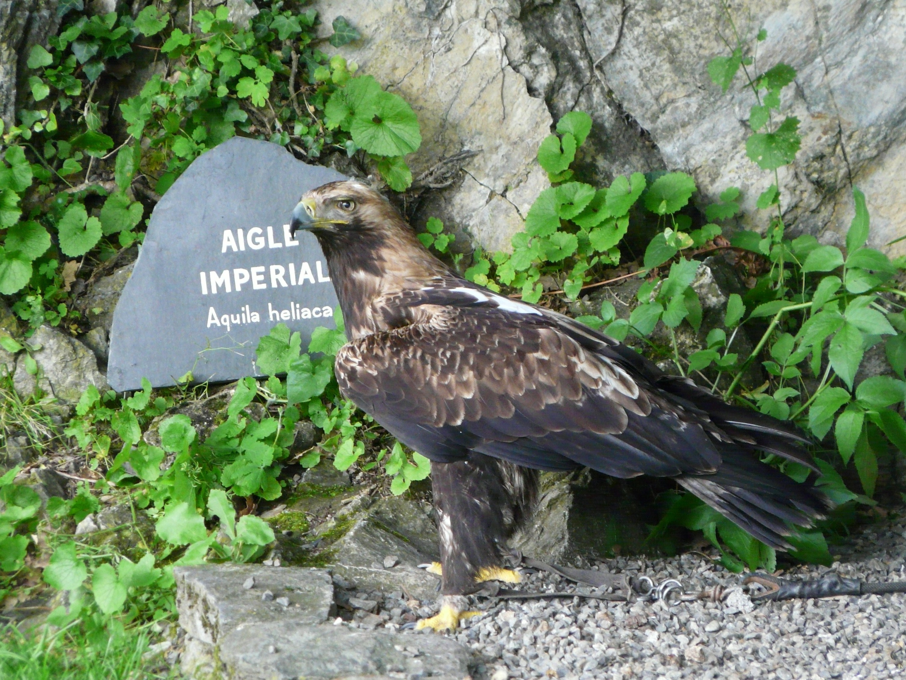 Aigle impérial (Aquila heliaca), château de Beaucens, Hautes-Pyrénées, France.